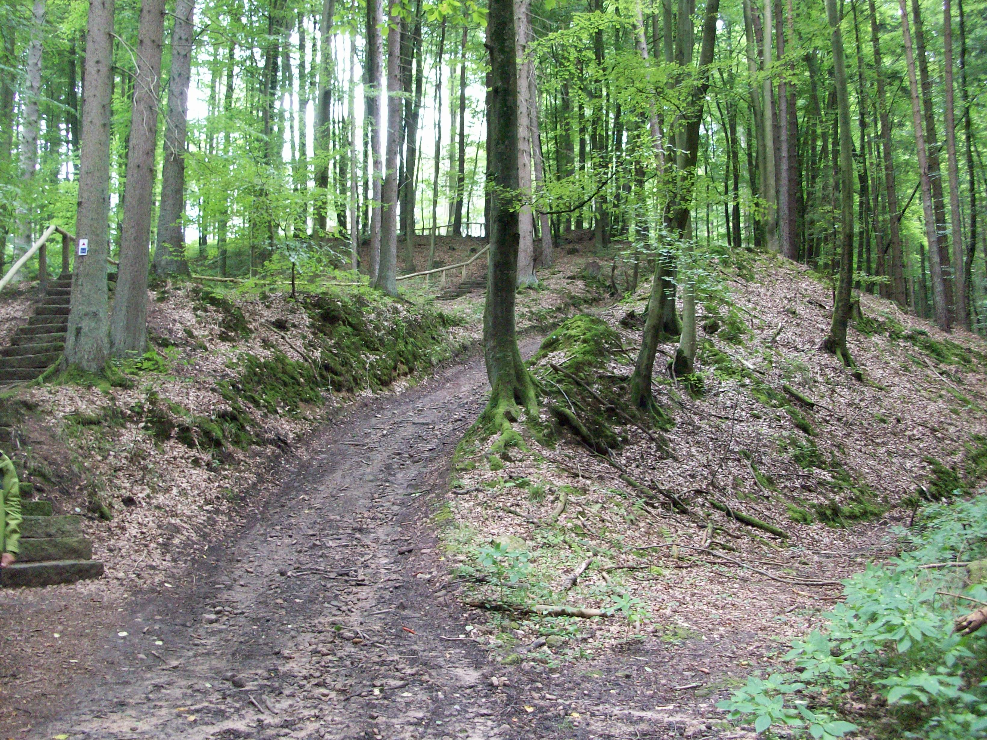 Neuer (Treppen) und alte Aufstieg (mittelalterlich) zur Burg